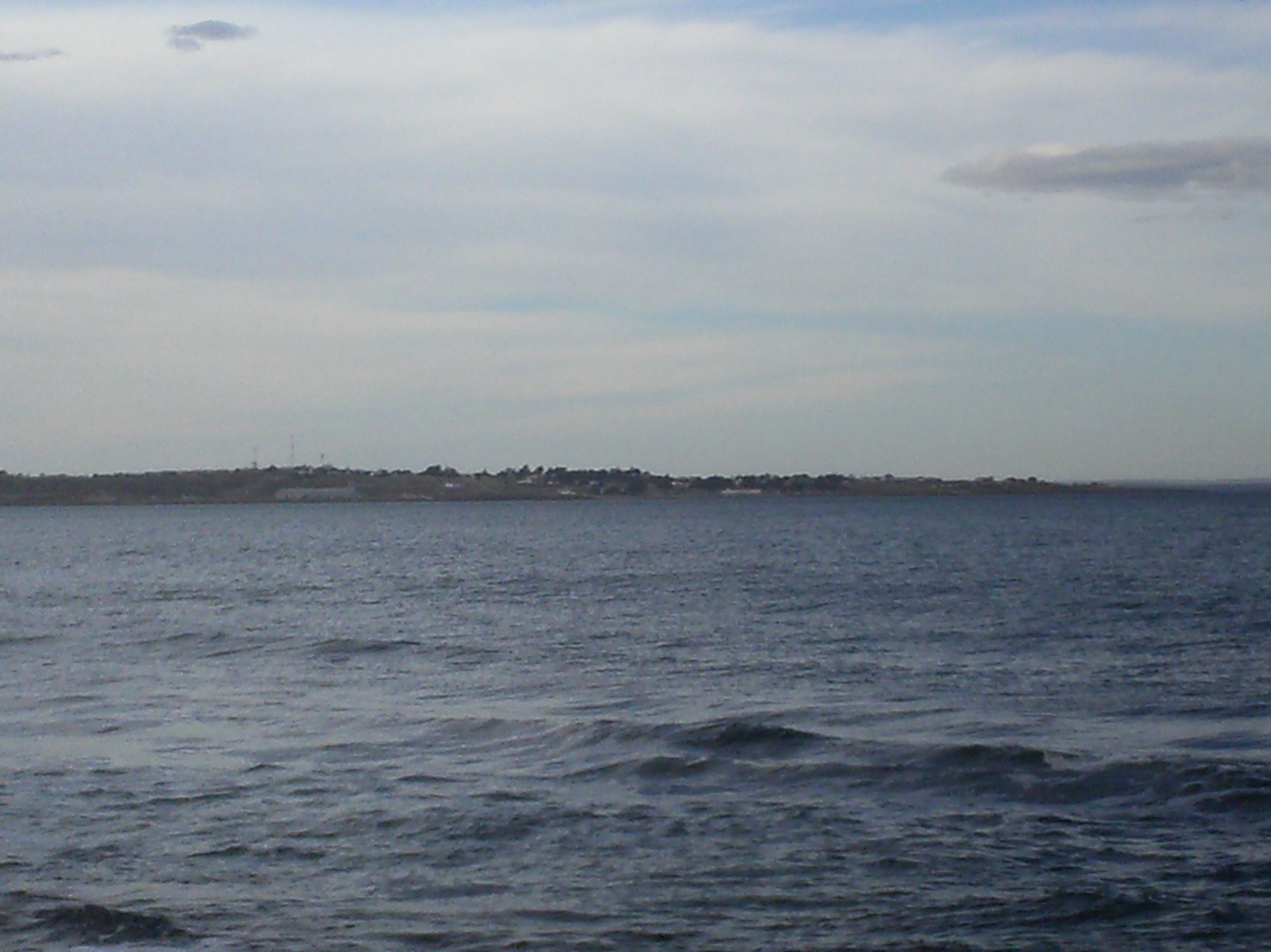 DESDE CABO DOS BAHIAS EL POBLADO